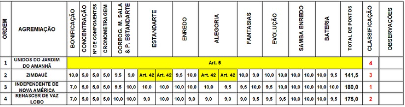 Resultados dos Blocos C - RJ 2020